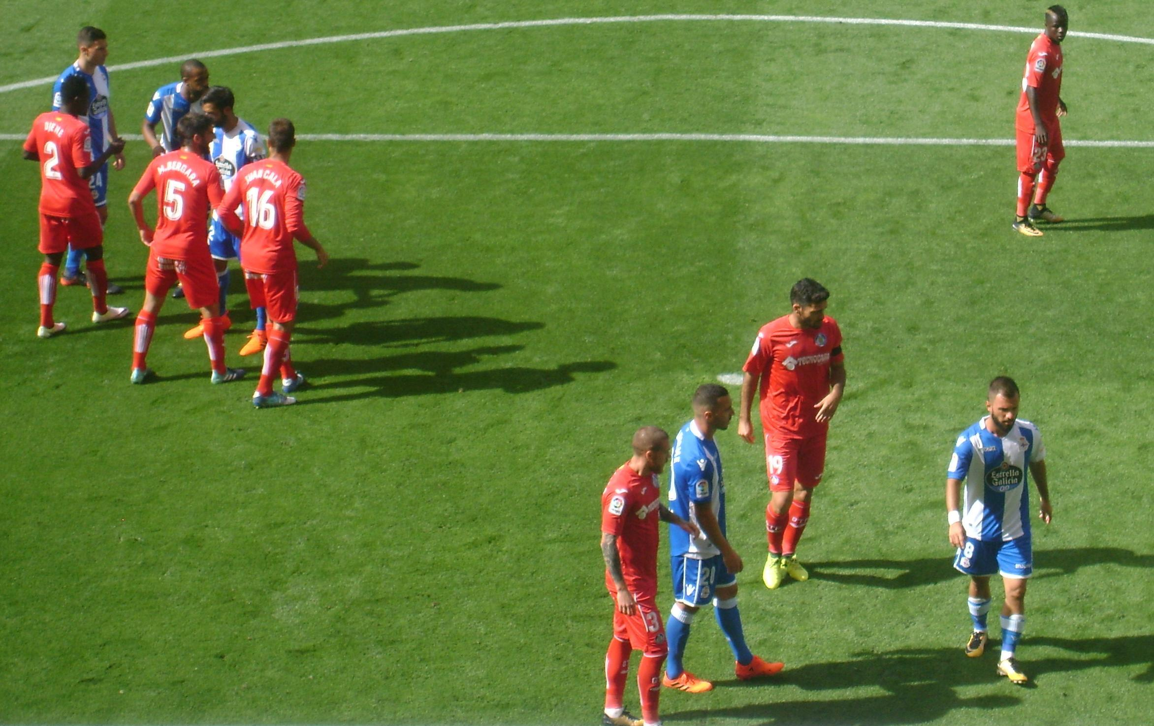 deporgetafe